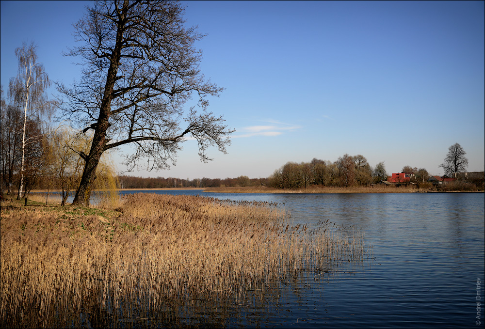 Станькава. Рака